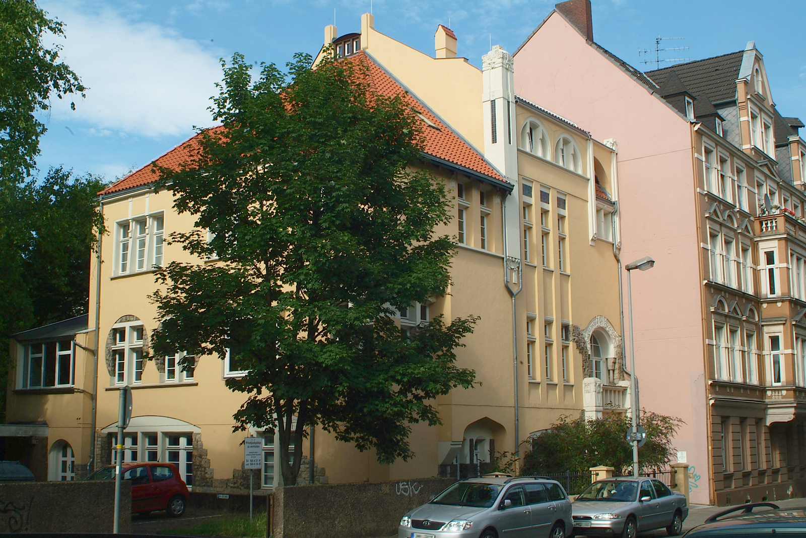 Badenstedter Straße 12 in Hannover-Linden, ehemalige Dienstwohnung für den Bürgermeister Hermann Lodemann, Architekt Georg Fröhlich, erbaut 1905, Blick in Richtung Nebengebäude und Lindener Marktplatz ...